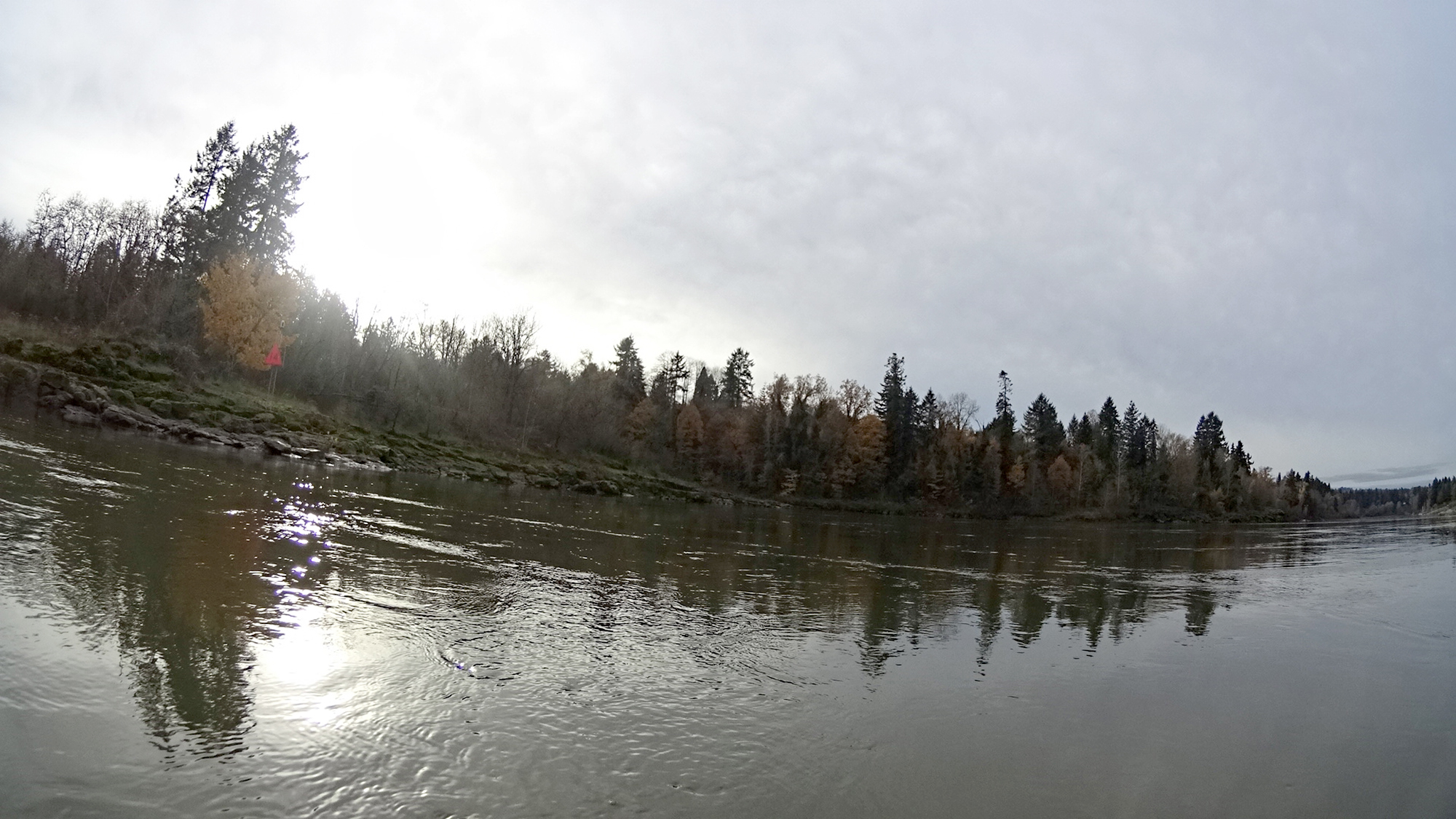 Hog Island Willamette River Oregon